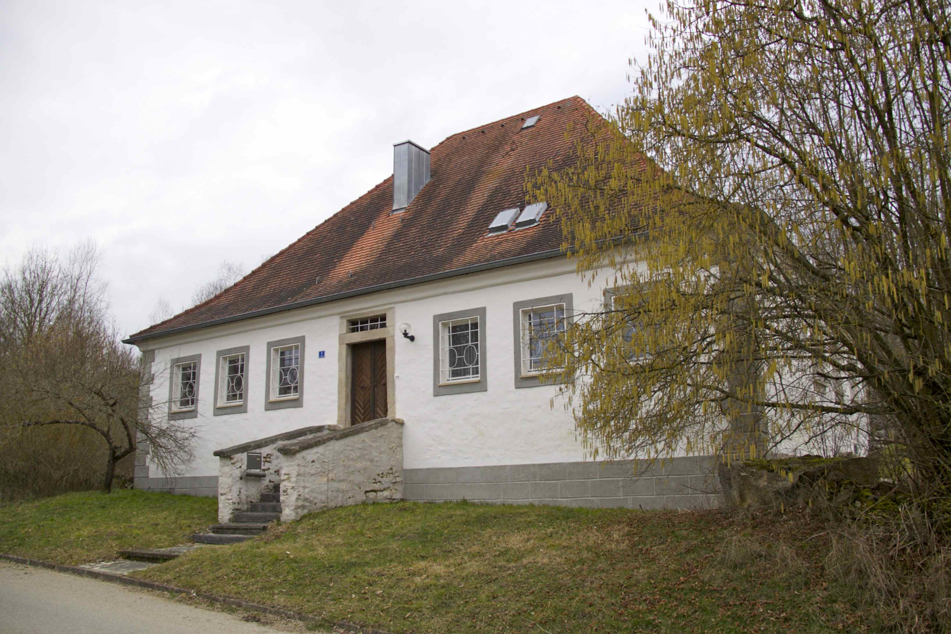 Büttelbronn Mauthaus 1